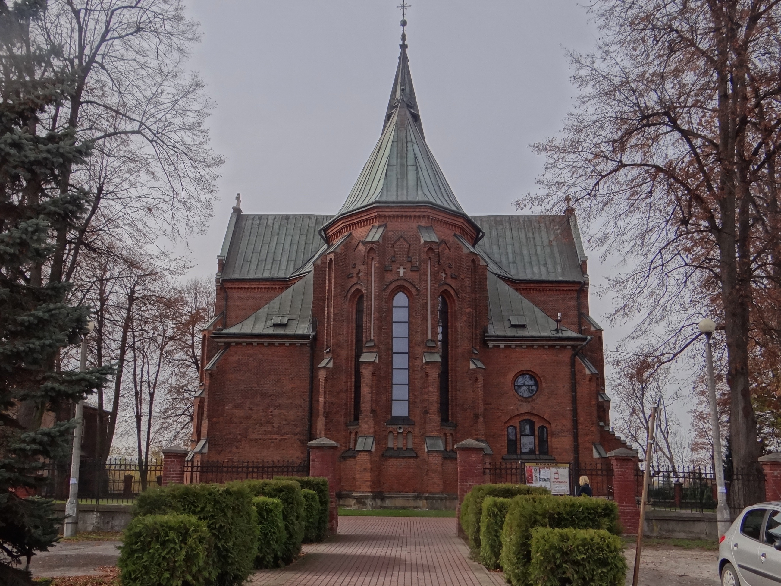 Kościół w Jadownikach